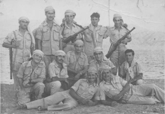 מצולמים בתמונה: שורה עליונה מימין לשמאל - מועלם יחזקאל, מאיר בר טל, אברמוביץ יצחק, היינה יוסף, בטיש שלמה. שורה אמצעית מימין לשמאל - חייל לא מזוהה, רפאלי רפאל, קובי אגרנוב, נוריאל נורי, מצגר אביגדור. שוכבים מימין לשמאל - ענבר בנימין, אהרון קמארה.